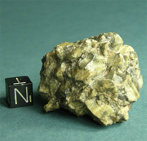 Tatahouine diogenite meteorite